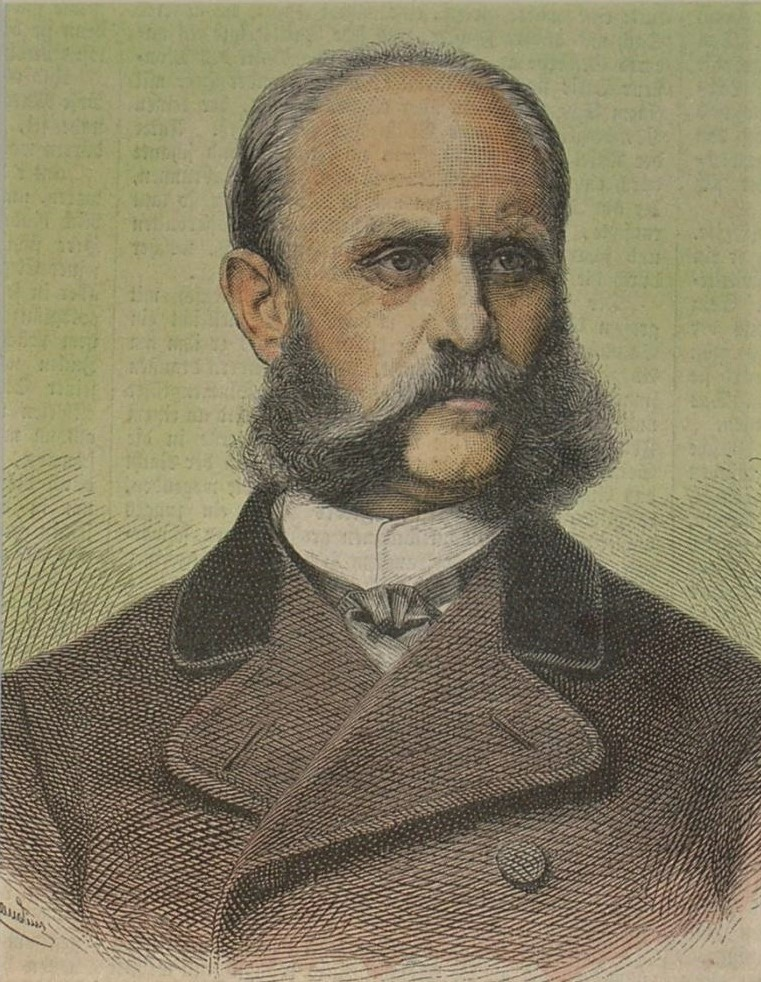 Karl von Hofmann, Präsident des deutschen Reichskanzleramts, 1876, teilkolorierter Holzstich, ca. 13 x 12 cm